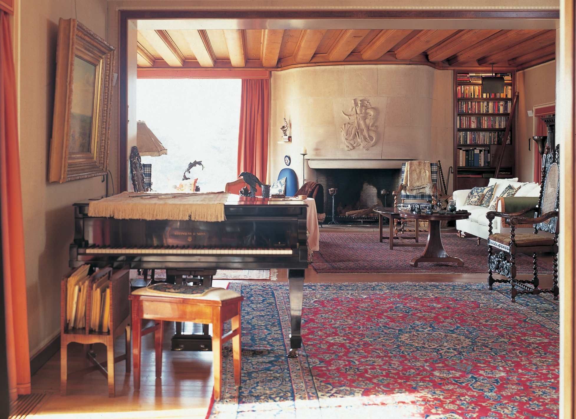 Woonkamer met grote vensters op het zuidwesten, een schouwpartij met een reliëf van St. Joris op de zandstenen schouwboezem en een houten plafond.